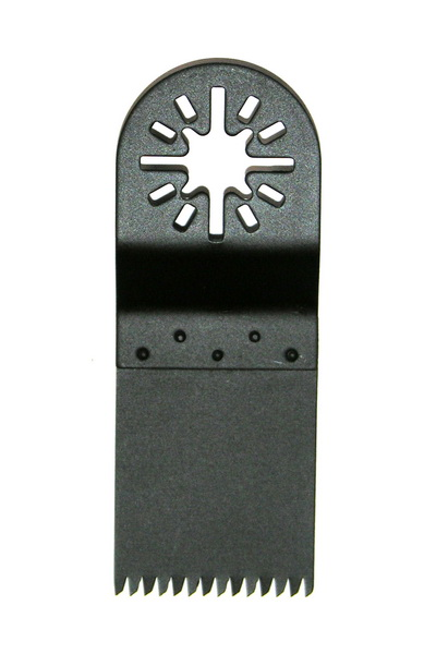 Пильное полотно с замкнутым посадочным кольцом для универсального резака